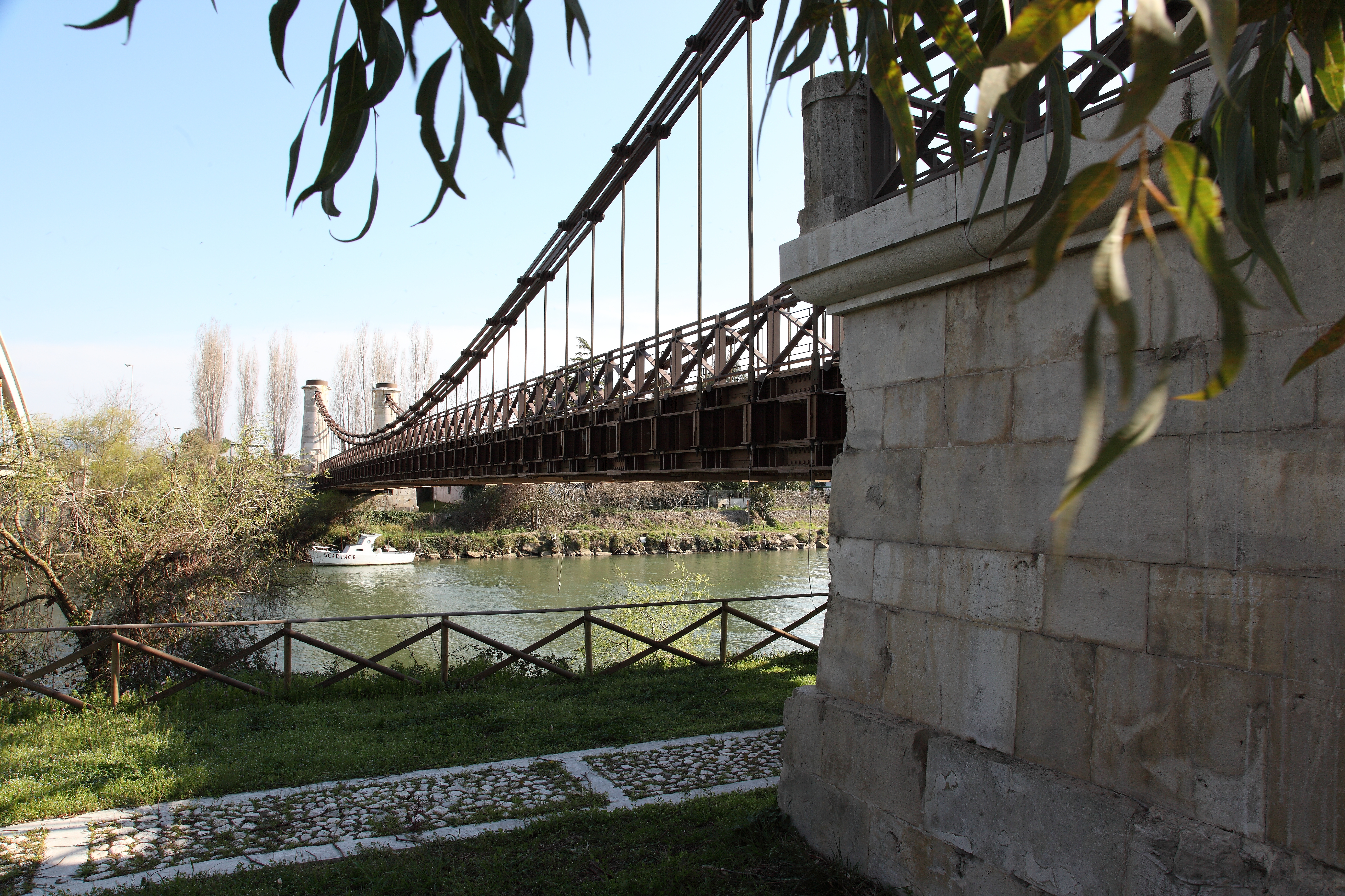 Si tratta del primo ponte in ferro sospeso dell'Europa continentale e secondo al mondo costruito per attraversare il fiume Garigliano dell'allora Regno delle Due Sicilie.